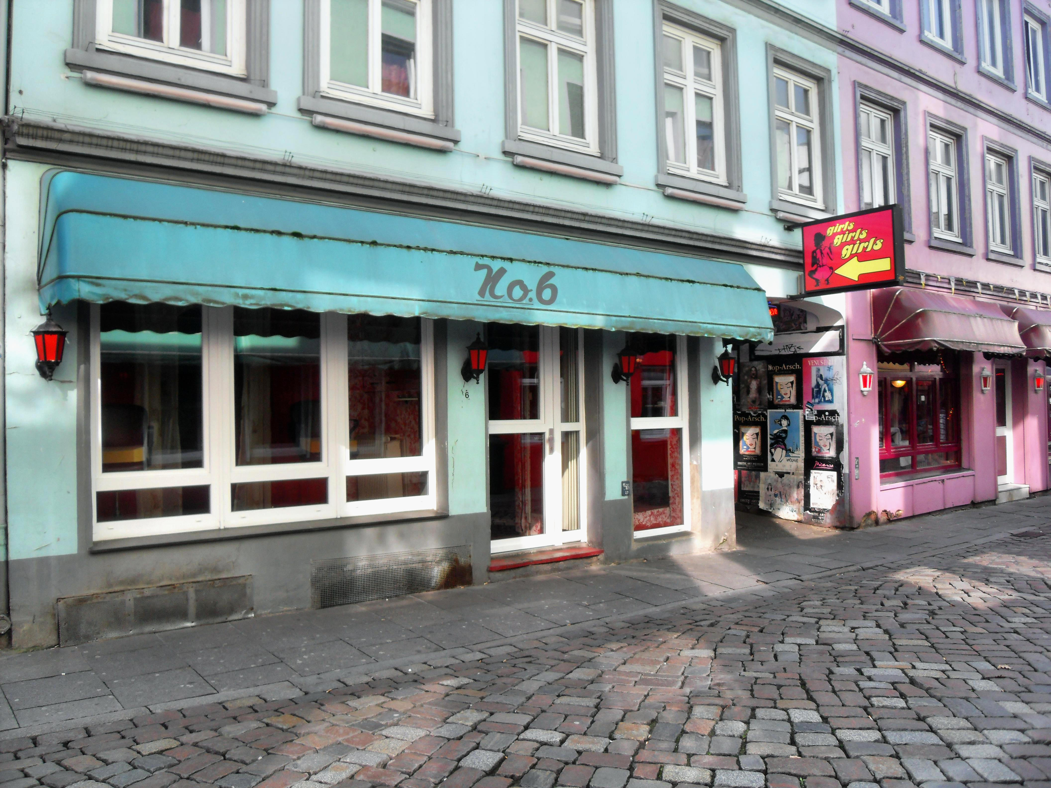 Herbertstraße in Hamburg-Sankt Pauli